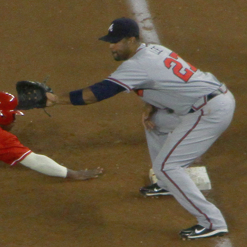 Derrek Lee